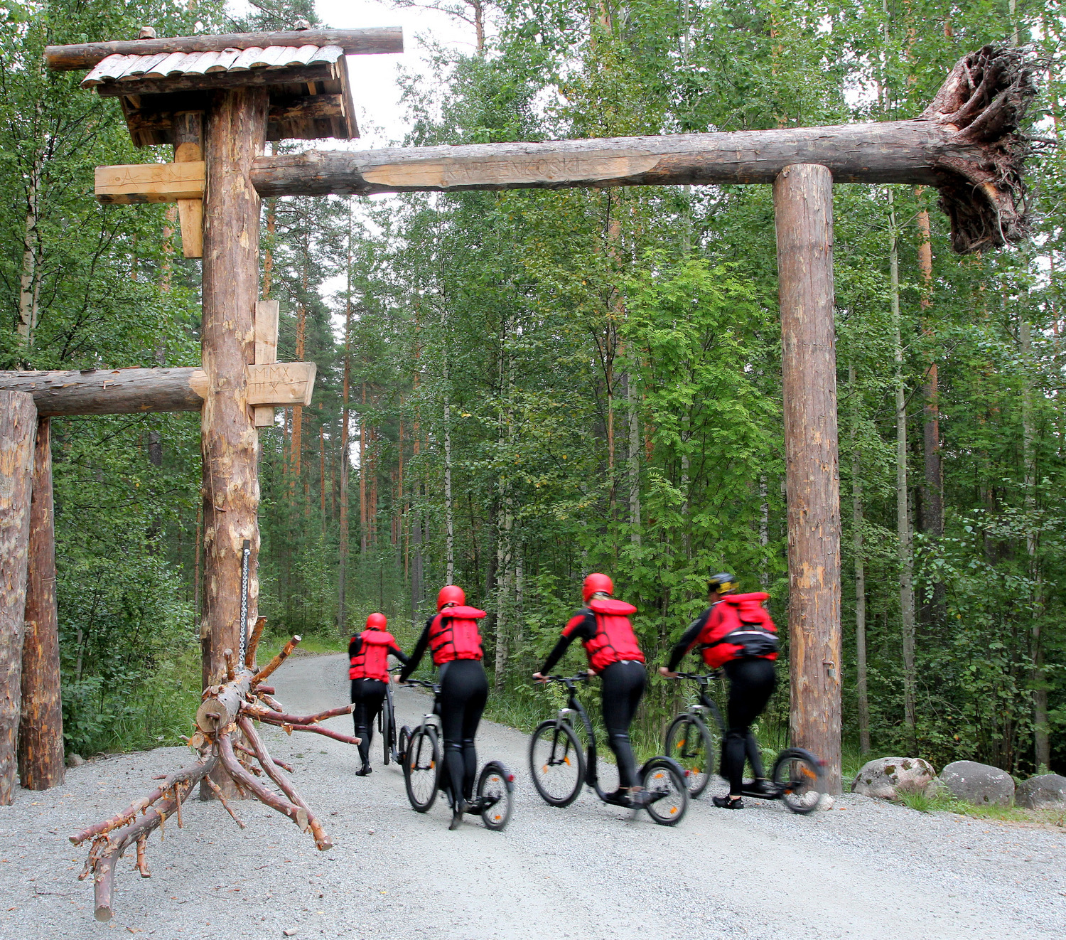 Äänekosken Kapeenkoskelle johtava Honkaportti